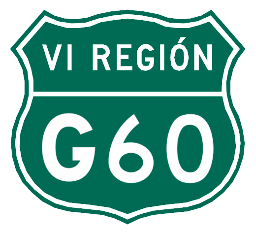 Escudo de la Ruta G60